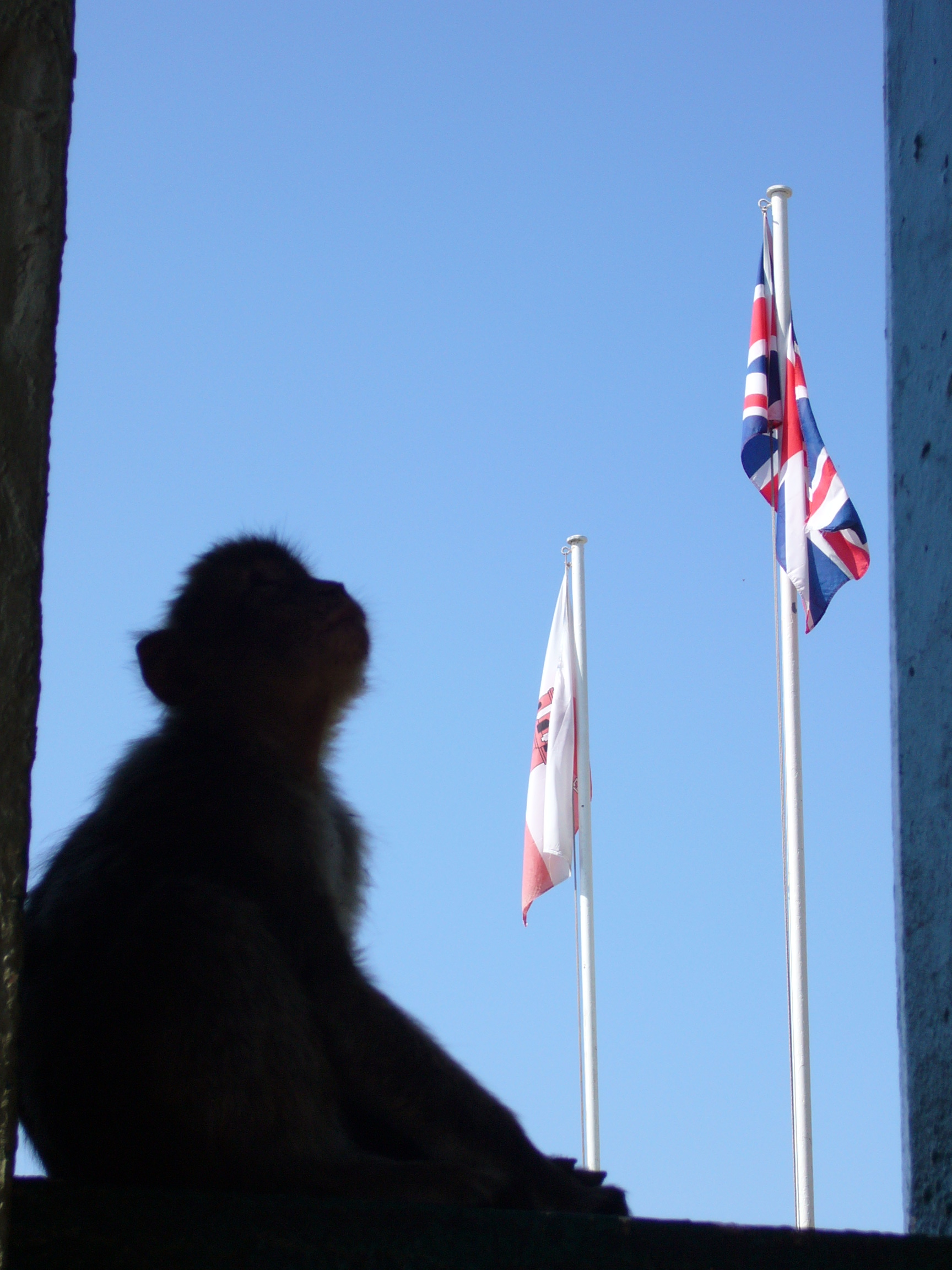 Ur marmouz e Gibraltar